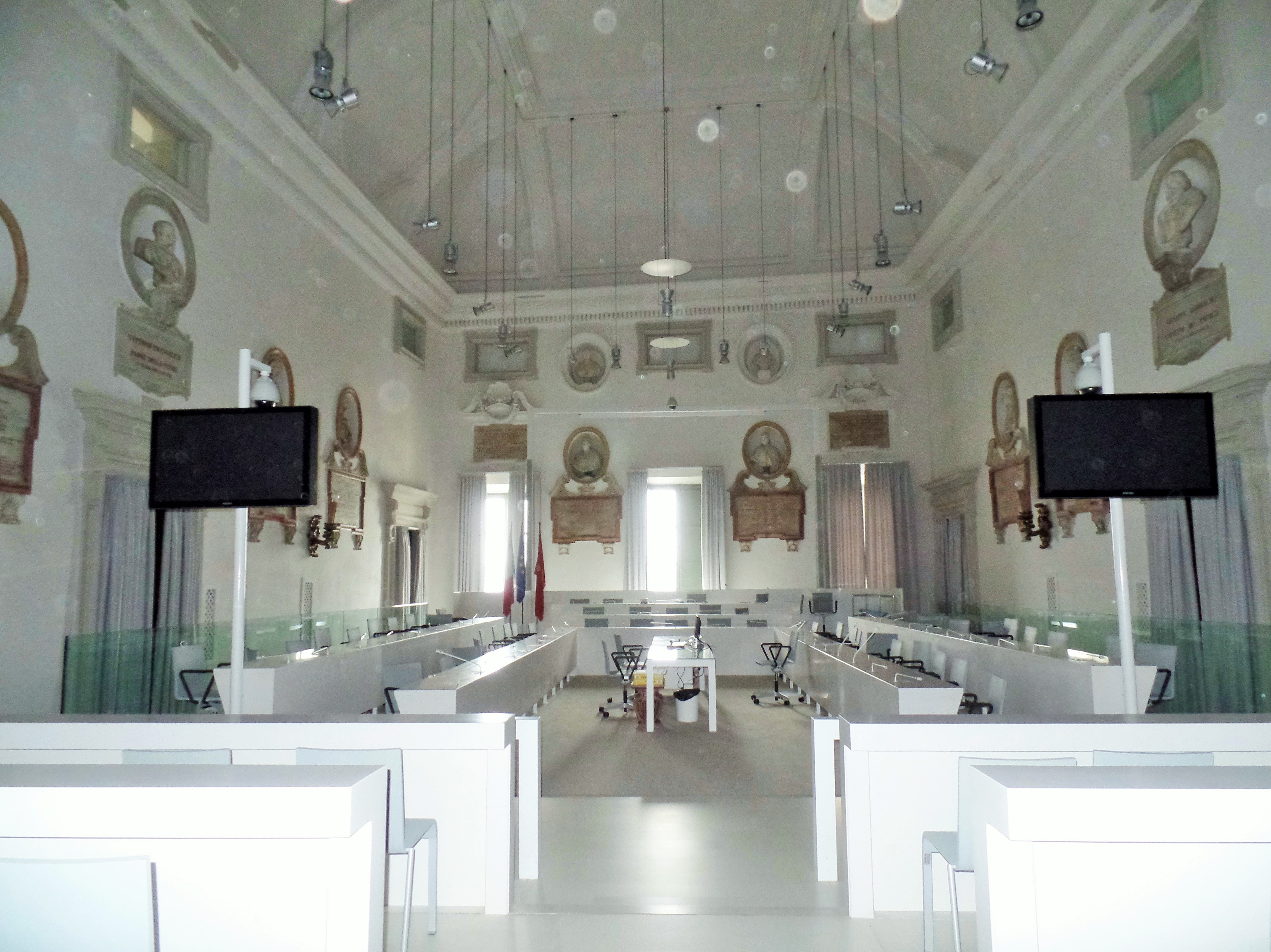 Palazzo degli Anziani Ancona sala Consiglio Comunale